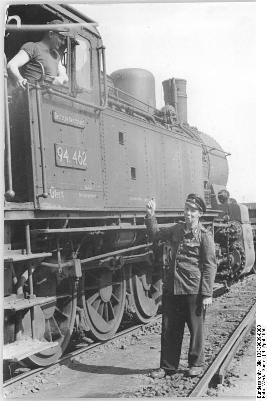 Dampflok 94 462 (BR 94), Lokbrigade Zentralbild Leipzig (Weiß) 4.4.1956 Verdiente Eisenbahner der Deutschen Demokratischen Republik 1956. Herbert Franz, Rangiermeister, Bahnhof Leipzig-Plagwitz. Begründung: Durch die Anwendung der Mamedow-Methode, seit zwei Jahren unfallfreies Arbeiten und eine gute Arbeitsdisziplin, hat es der Kollege Franz verstanden, die Wagenaufenthaltszeiten von 2,40 Stunden auf 1,88 Stunden zu senken. Die Brigade Franz besitzt den Titel "Brigade der ausgezeichneten und besten Qualität". Sie verwirklichte im Jahre 1955 ihre Verpflichtung, 10 000,-- DM einzusparen. Ein besonderes Verdienst des Kollegen Franz ist die Aufstellung eines Brigadeplanes, der es ermöglichte, die Leistungen und den verursachten Aufwand der Brigaden gegenüber zu stellen. Dieser Plan wurde von der Reichsbahndirektion am 1.4.1956 im gesamten Bezirk eingeführt. gesperrt bis zur offiziellen Auszeichnung.